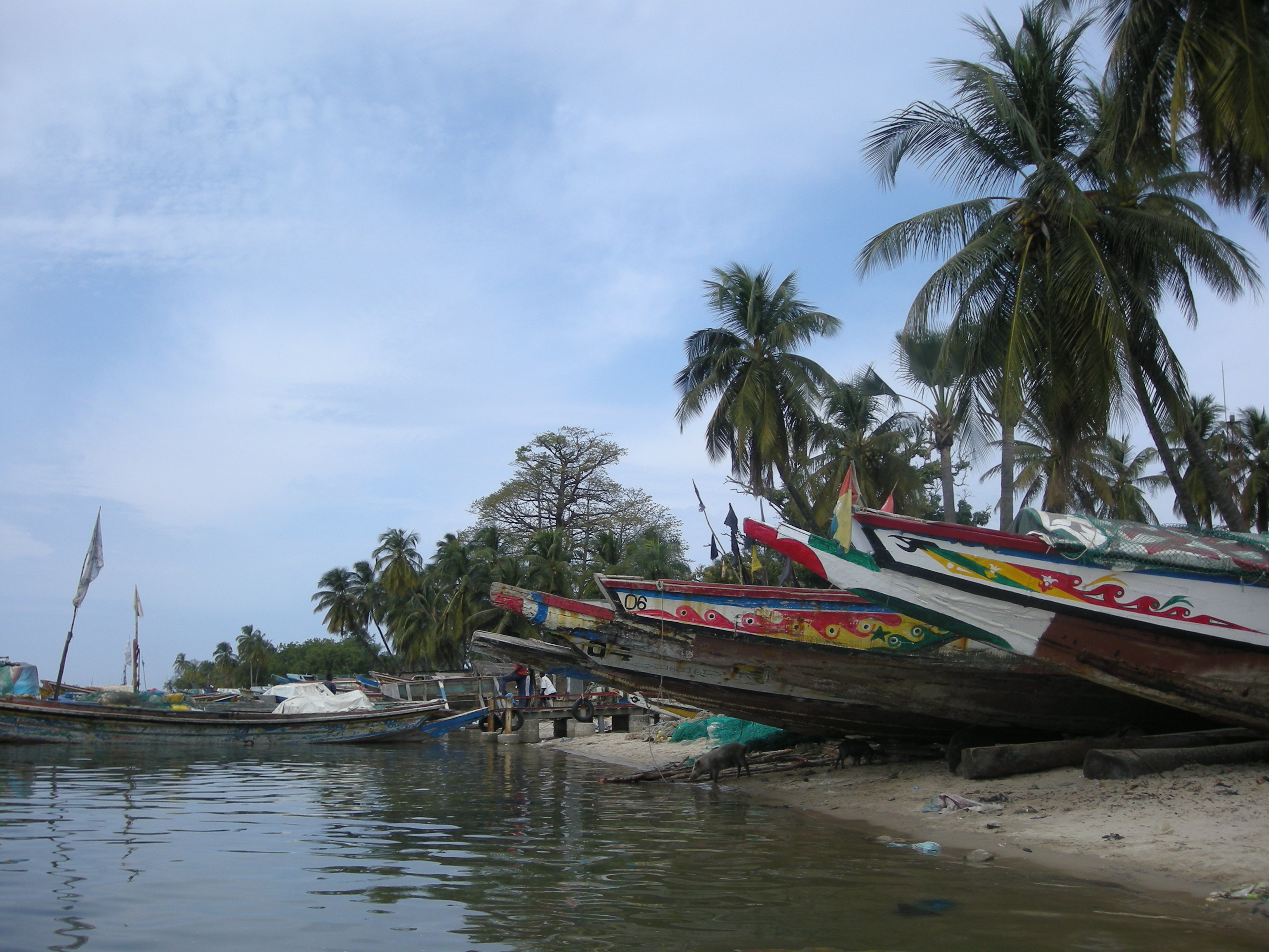 Pirogues de pêcheurs sous les palmiers à Elinkine (Casamance, Sénégal)